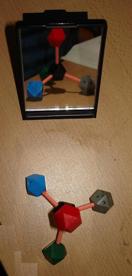 Imagen especular de una molécula de carbono con 4 substituyentes